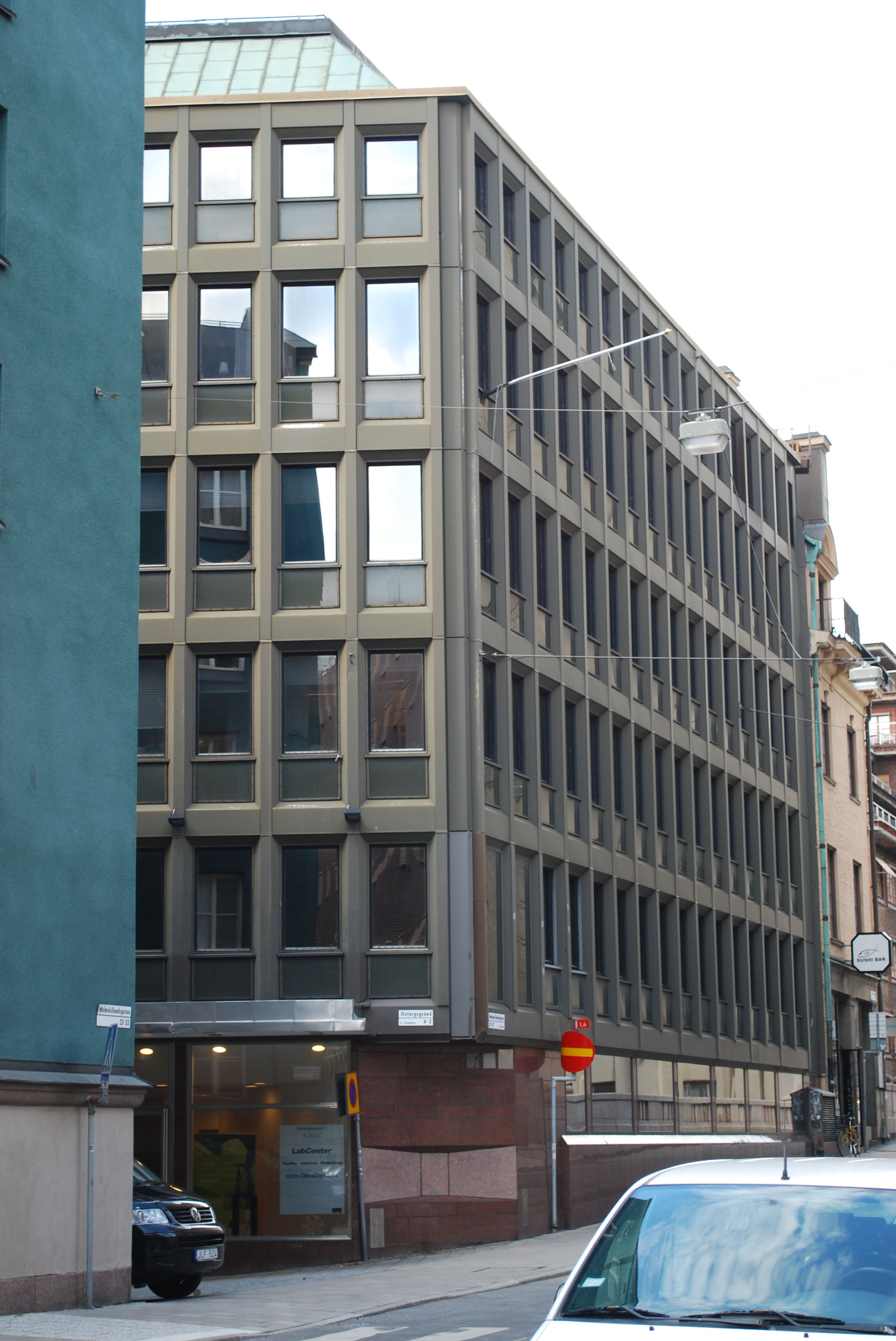 Järnplåten 29. Skaraborgs Enskilda Banks gamla stockholmskontor.